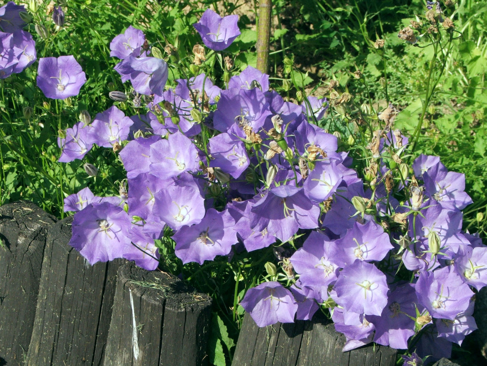 Campanula carpatica (kultywar)